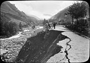 Baréges- route détruite le long du Bastan